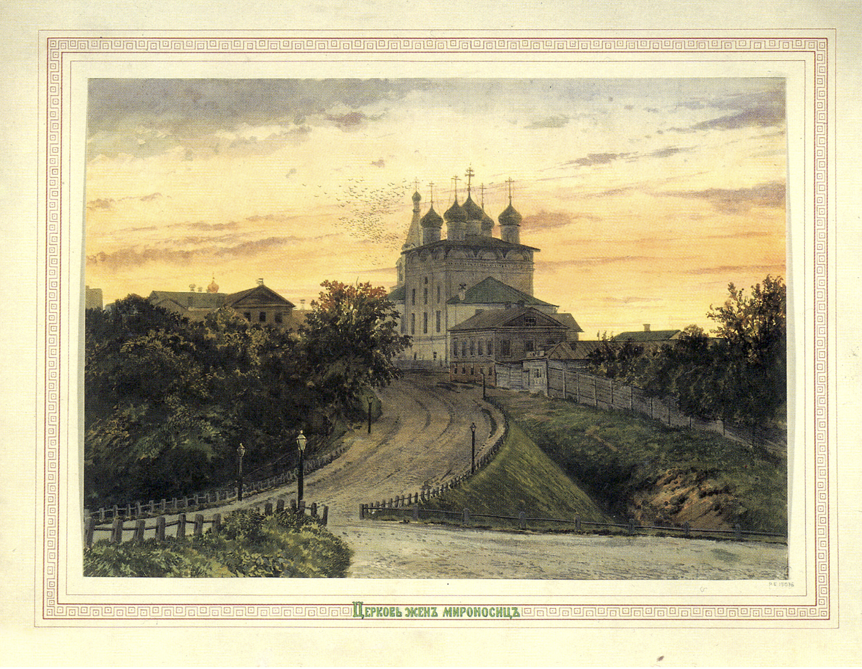 Церковь Жен-Мироносиц. Нижний Новгород. Альбом А.О. Карелина и И.И. Шишкина